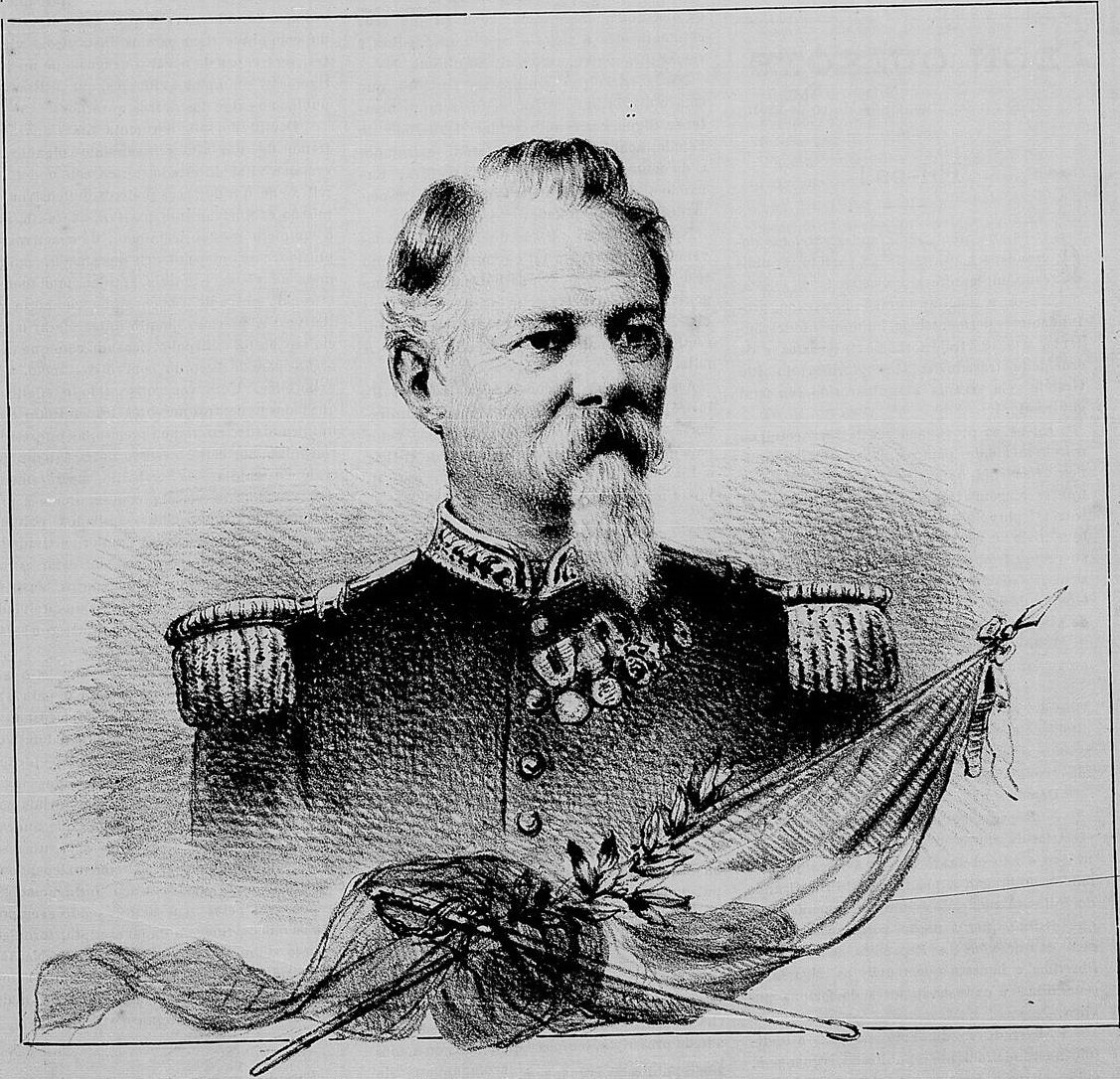 Marechal Eneas Galvão, Barão de Rio Apa.